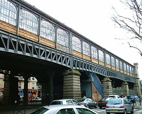 La station aérienne La Chapelle du Métropolitain de Paris.